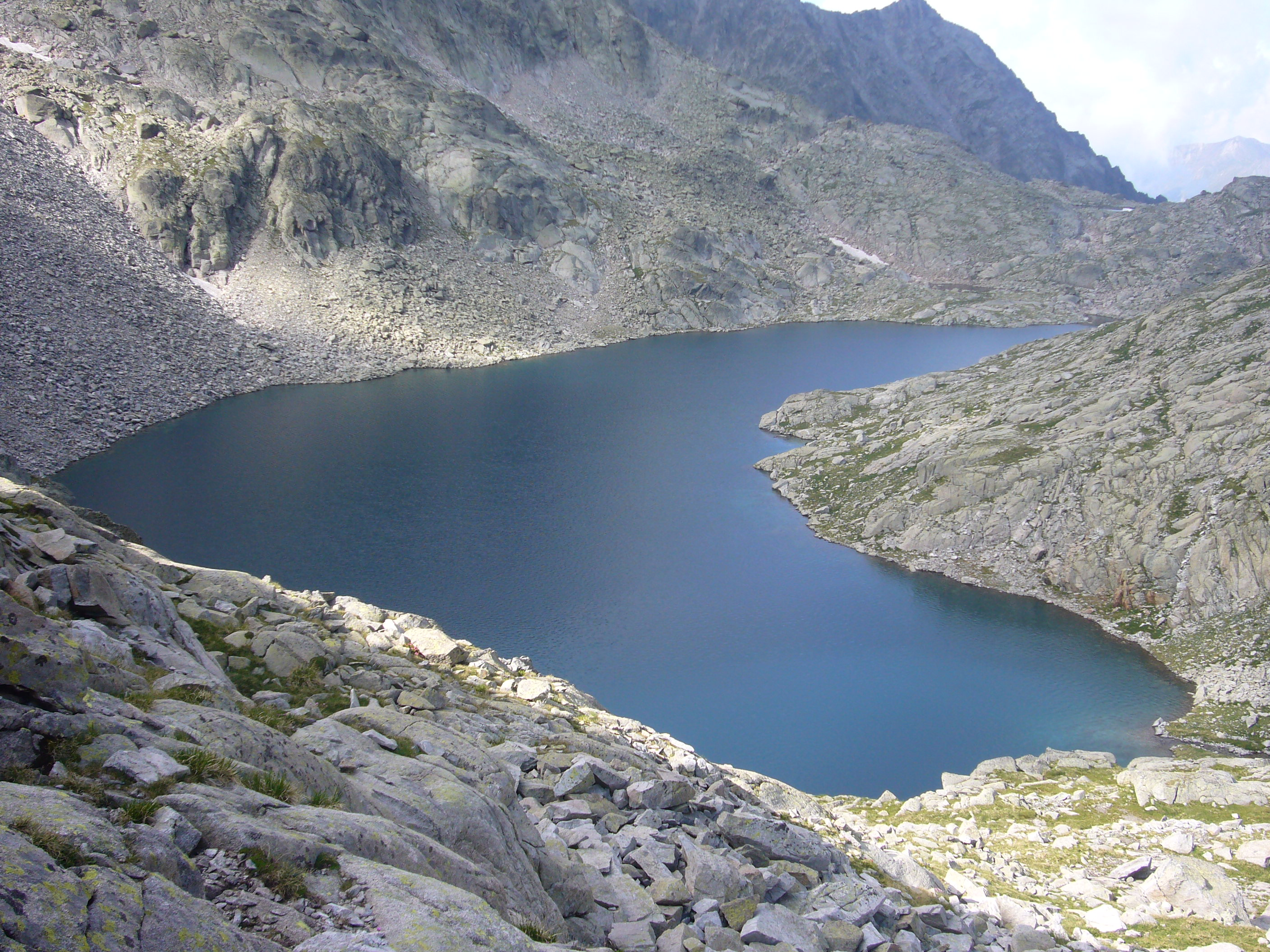 Estany Inferior; la Vall de Boí, Alta Ribagorça, Catalunya